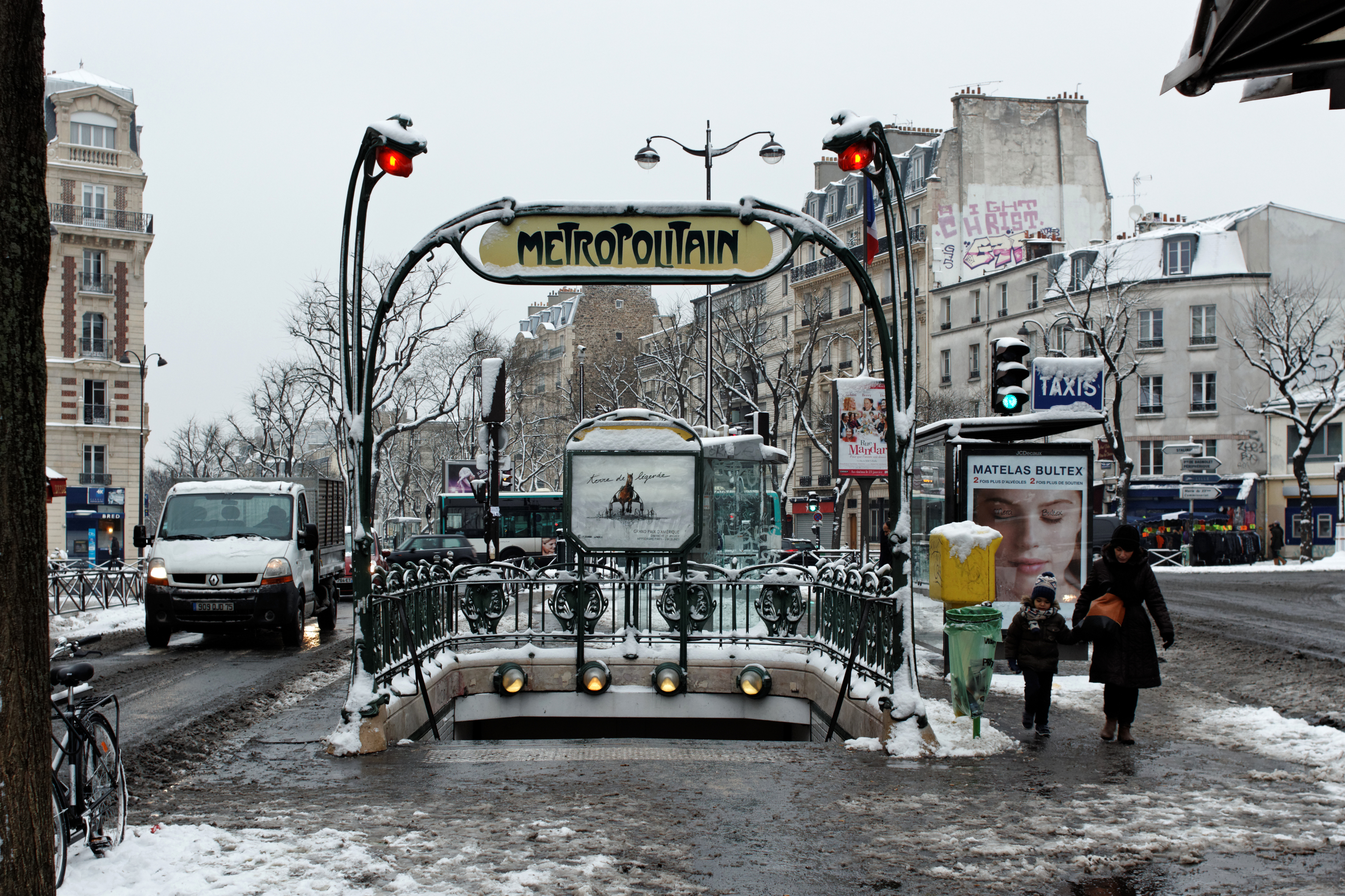 Métro Père Lachaise sous la neige